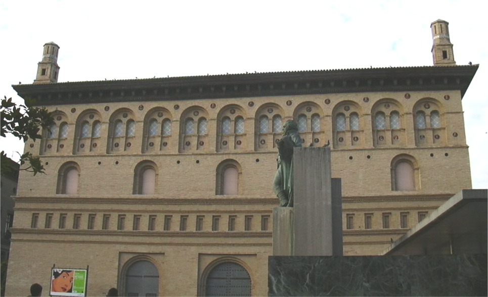 Lonja, Zaragoza - Vista general